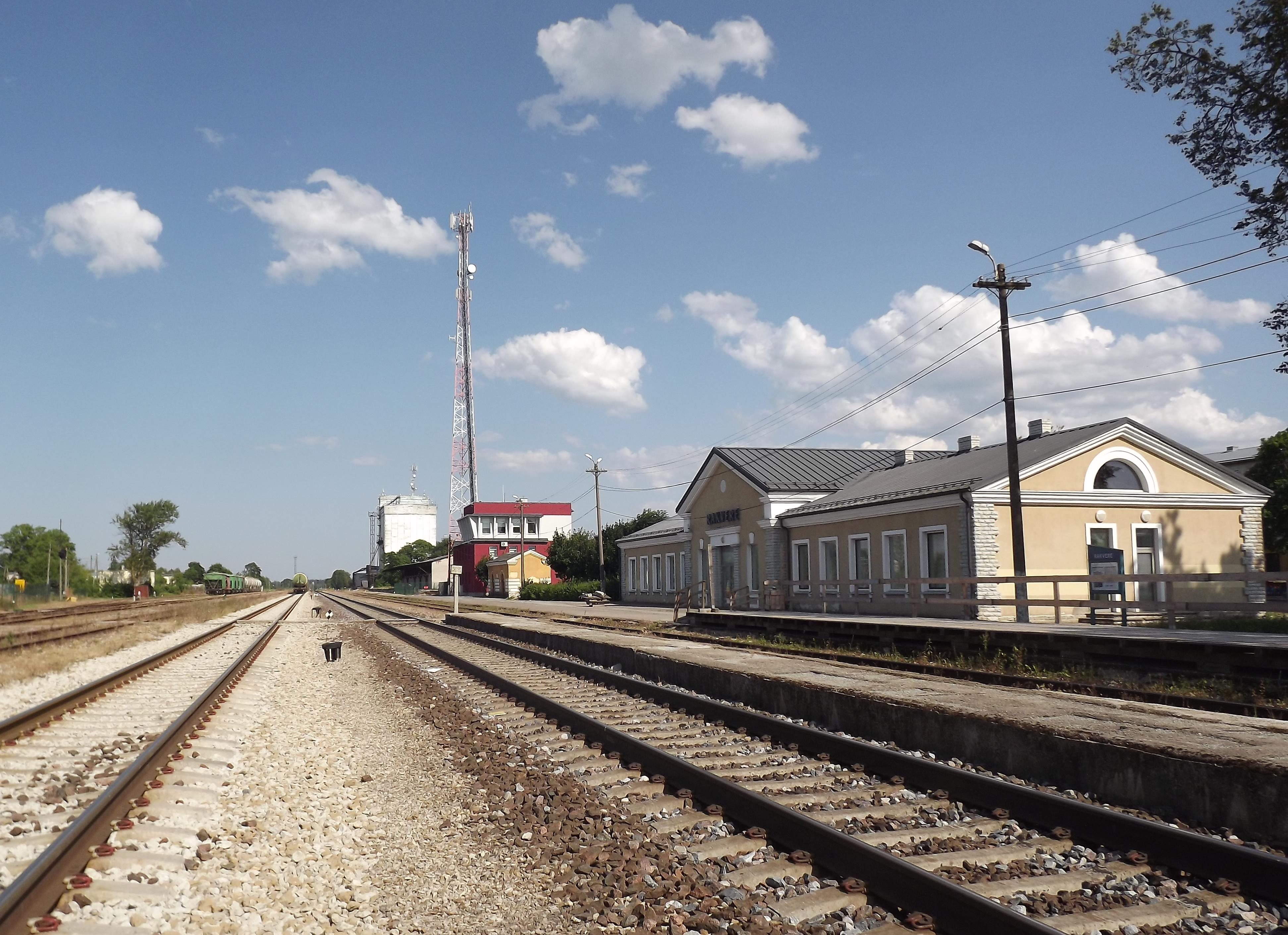 Rakvere raudteejaam.